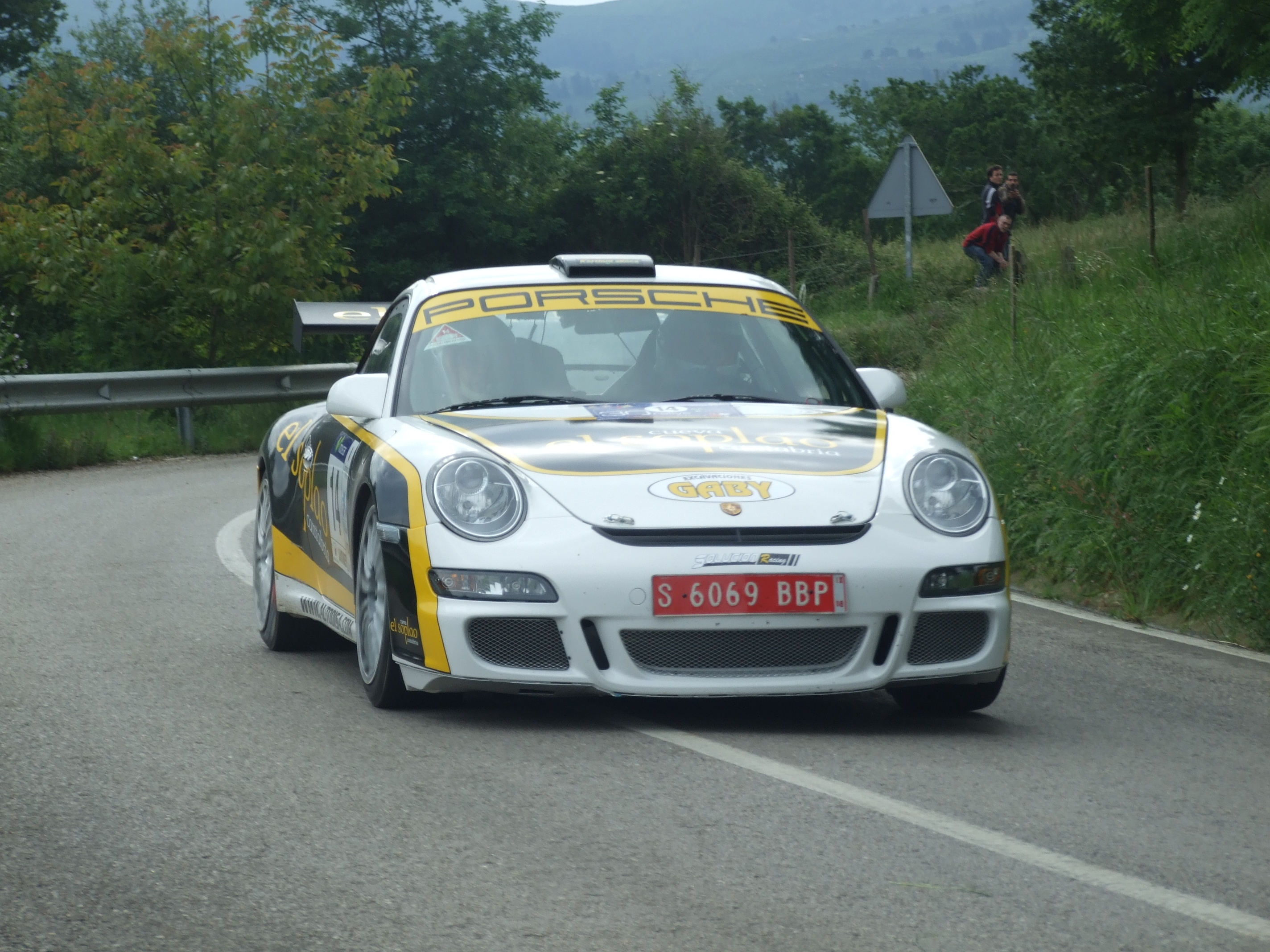 Eloy Entrecanales y Borja Odriozola con un Porsche 997 GT3 RS 3.6 en el Rallye Cantabria Infinita 2008, en Lloreda de Cayón